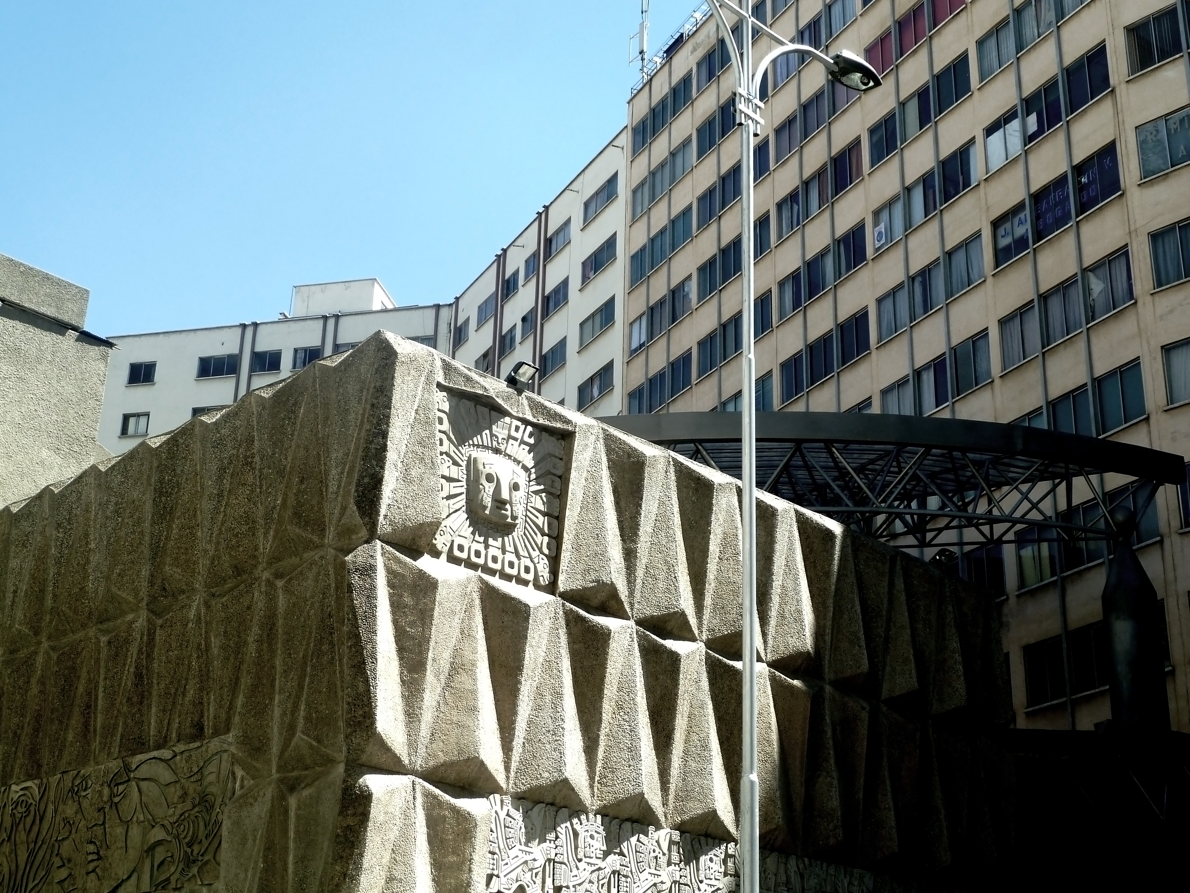 Casa de la Cultura Franz Tamayo This medium shows the protected monument with the number L/00-065 in Bolivia.